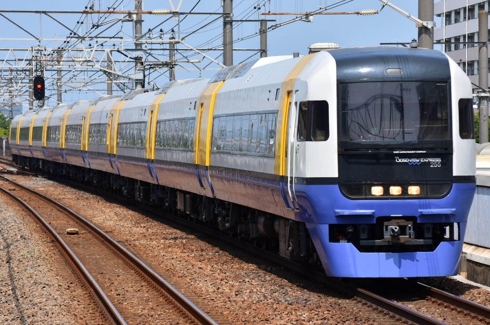 255系千マリBe-02 @新浦安駅